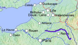 Kaart van de Aisne gebaseerd op kaart van Frankrijk in Wikimedia Commons